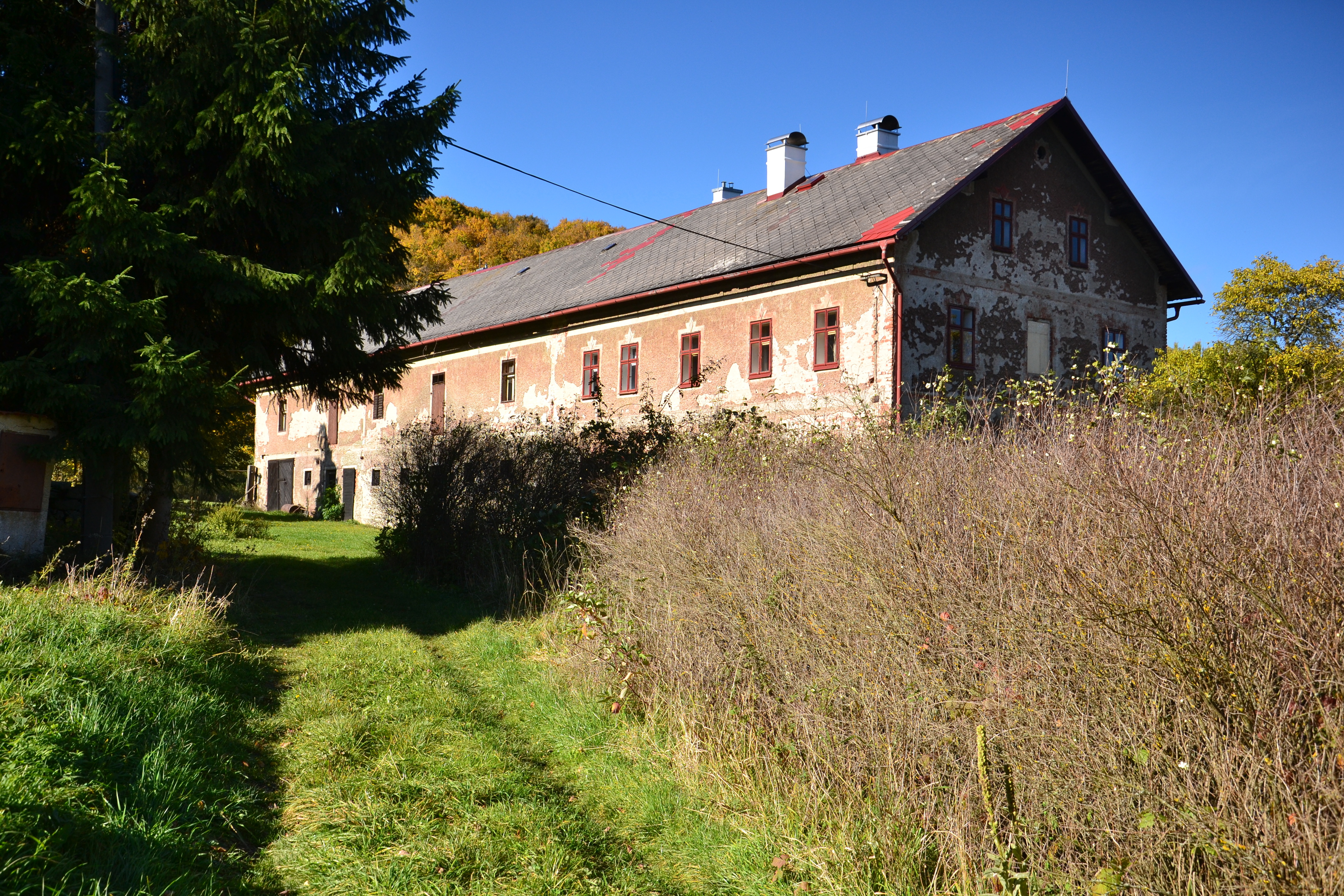 Jesínky – budova v severovýchodní části návsi